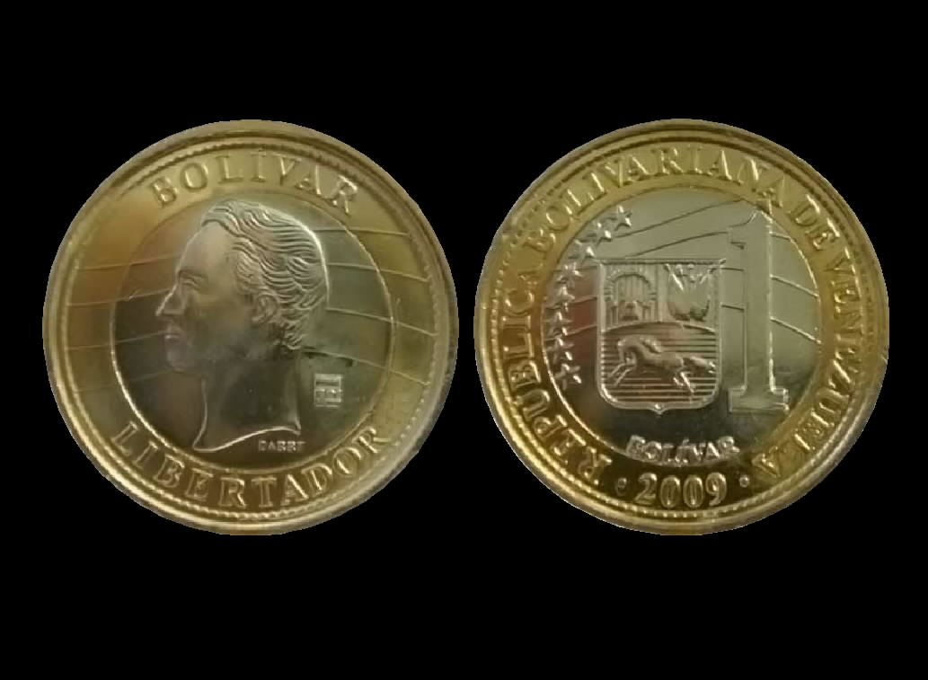 1 Bolivar 2009 BsF